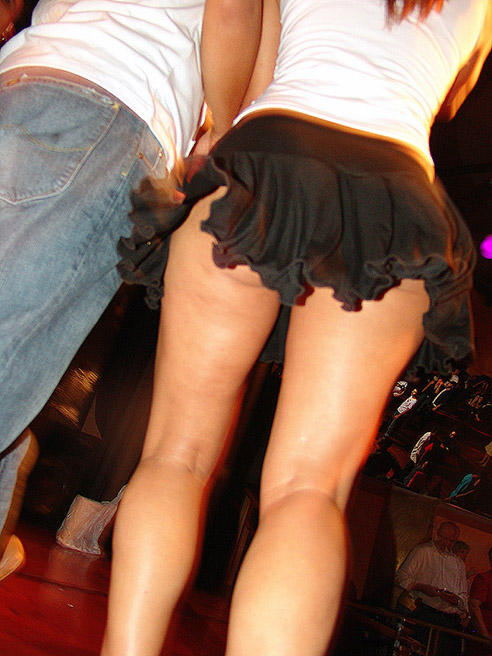 Márcia Imperator